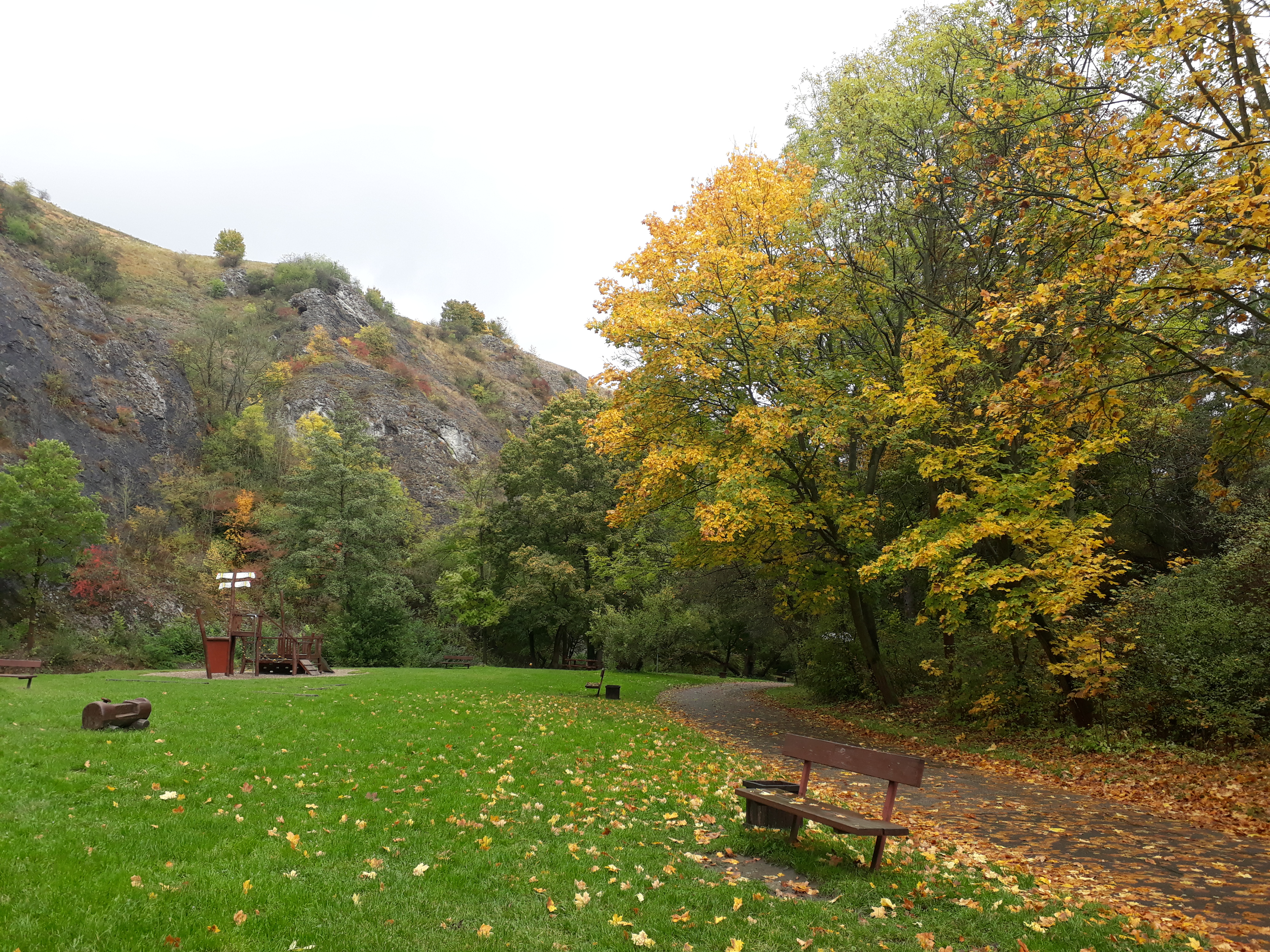 Barevný podzim v Prokopském údolí